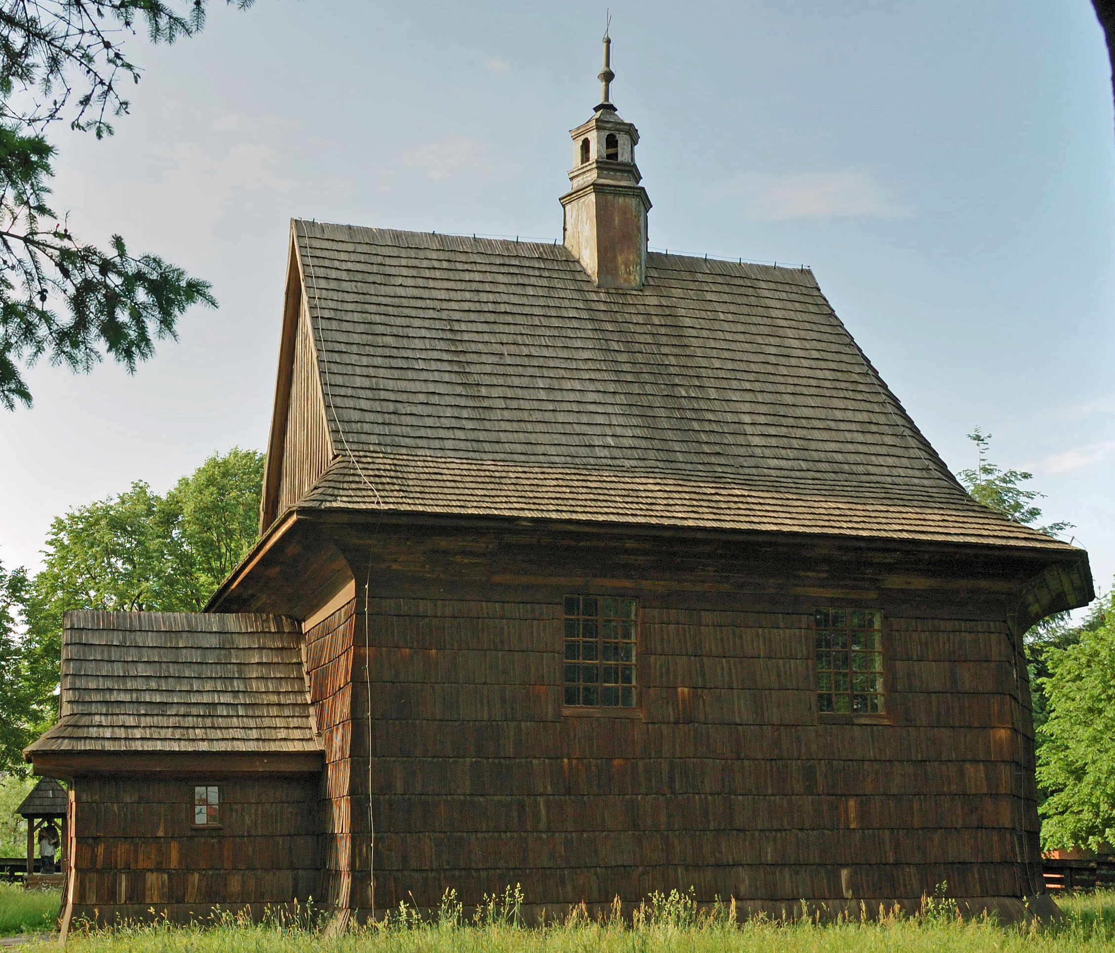 Kościół pw. św. Sebastiana w miejscowości Kosina, gmina Łańcut